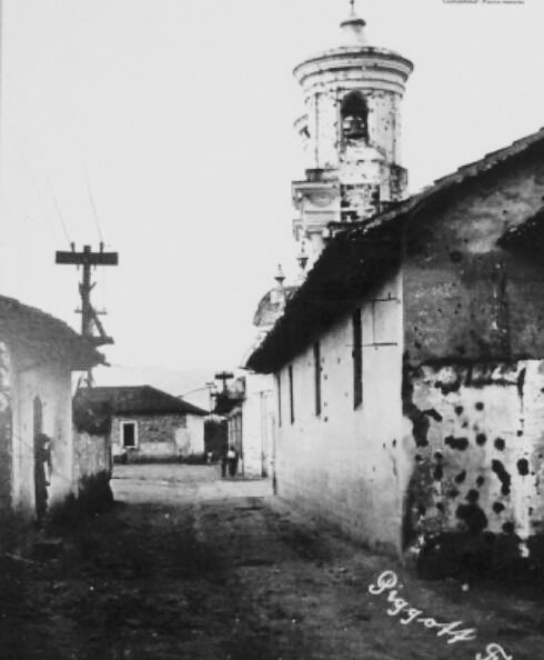 Capilla de San Juan de Dios luego de las batallas de la revolución quetzalteca en 1898.